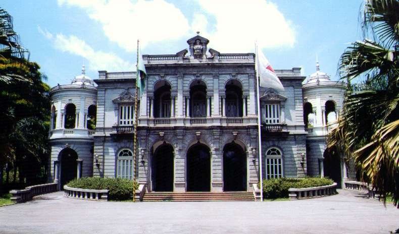 Vista frontal do Palácio da Liberdade em Belo Horizonte, Sede do Governo de Minas Gerais, Brasil.